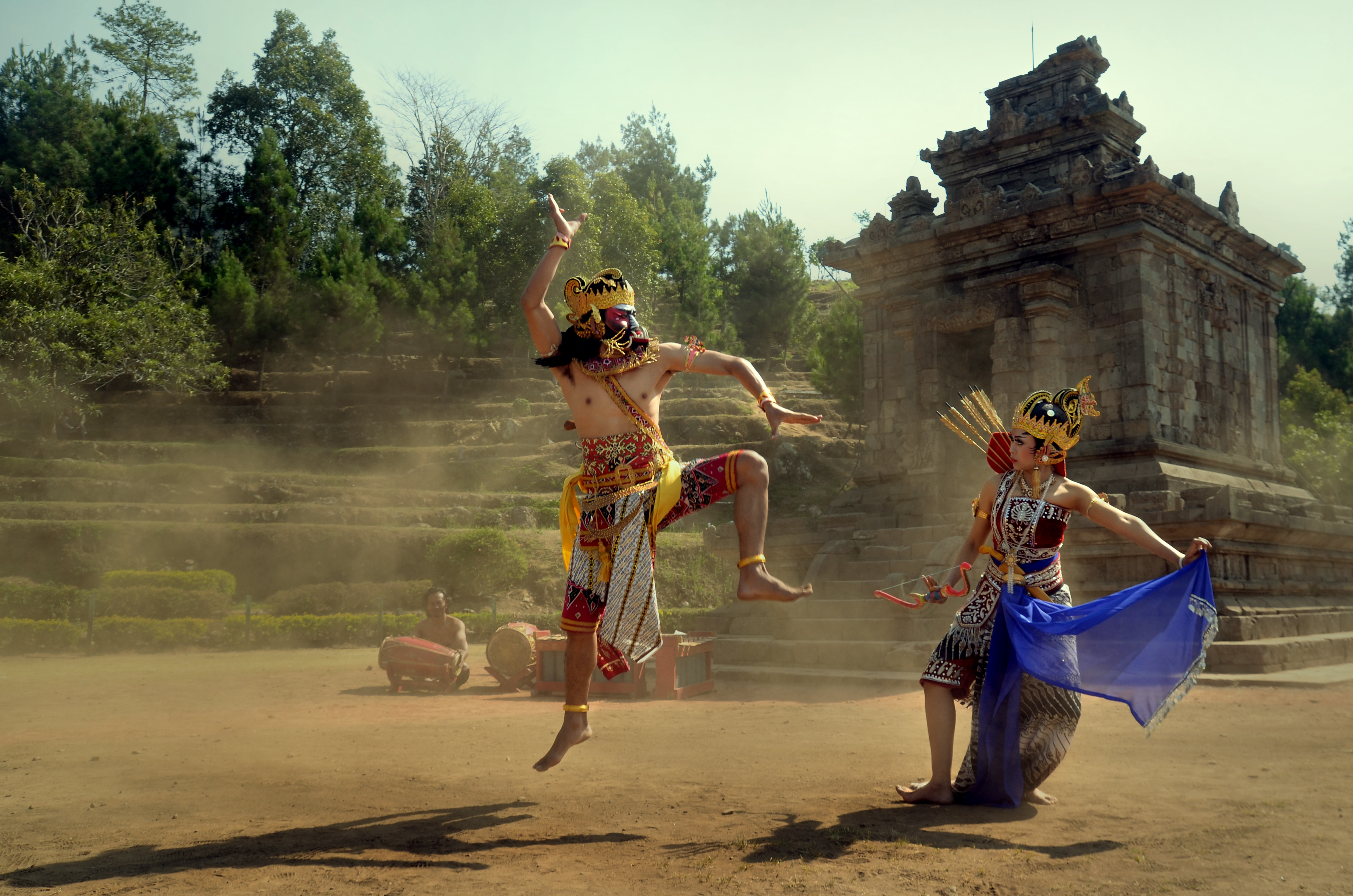 Tari Srikandi Cakil merupakan petikan dari cerita Mahabarata yang menceritakan bahwa Cakil yang diutus oleh Prabu Jungkung Mardeya dari Palanggubarja untuk memboyong Dewi Wara Srikandi yang akan dijadikan istri Prabu Jungkung Mardeya Tarian ini adalah salah satu tari gaya Surakarta Hadiningrat dari cerita lakon pewayangan “Srikandi Meguru Manah”. Menggambarkan seorang prajurit wanita perkasa pahlawan medan perang yang bertarung melawan raksasa kecil Cakil [rahang bawah yang lebih panjang dari pada rahang atas]. Dewi Srikandi tidak mau diperistri Prabu Jungkung Mardeya, dan terjadilah perang tanding yang dimenangkan oleh Srikandi dengan panah sakti yang diberi nama “Dakak” milik Arjuna.